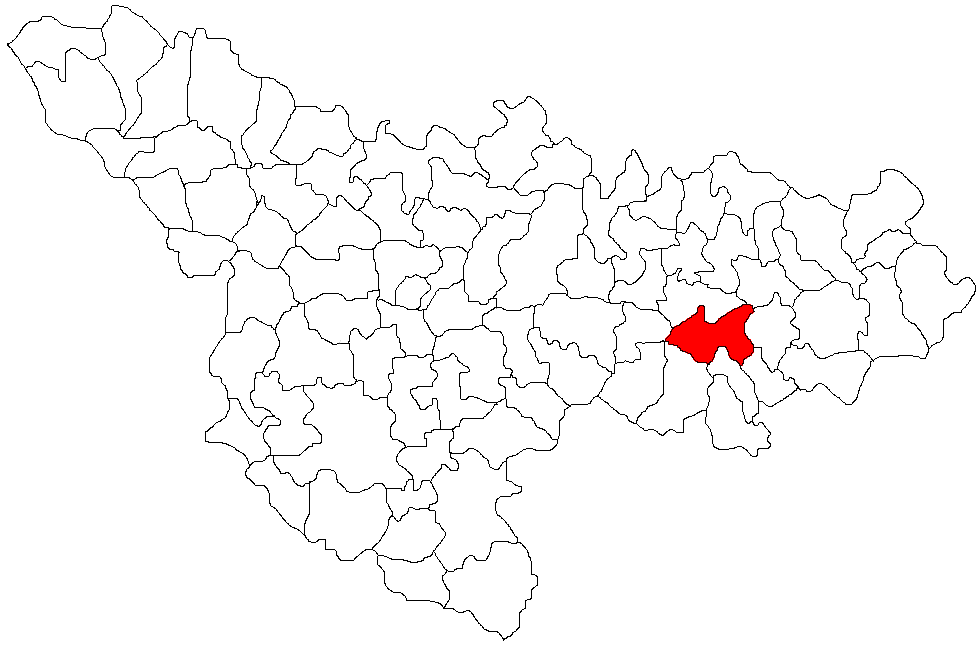 Categorie:Hărţi ale judeţului Timiş